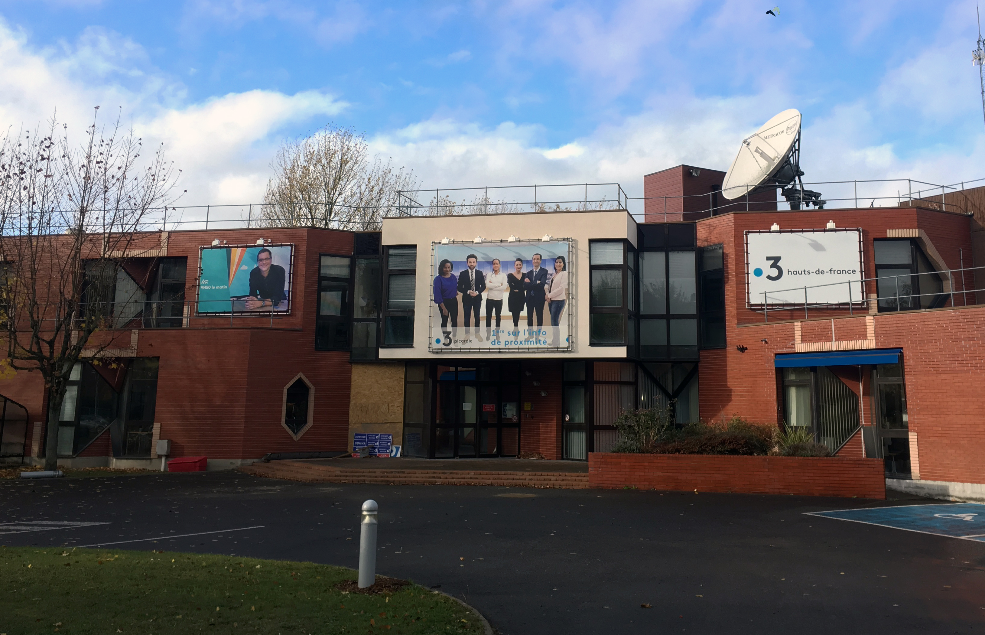 Le bâtiment de France 3 Hauts-de-France à Amiens (photo prise le 10 novembre 2018)